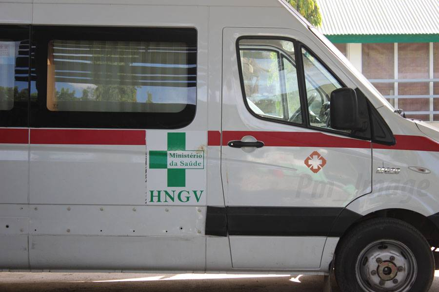 Ambulanz des Hospital Nasional Guido Valadares, Dili